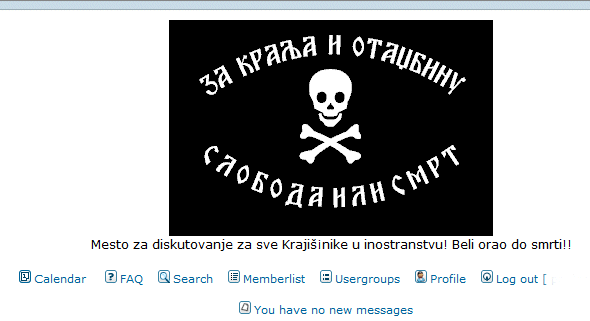 Srpskohrvatski / српскохрватски: Zaglavlje Stickypond Krajina foruma